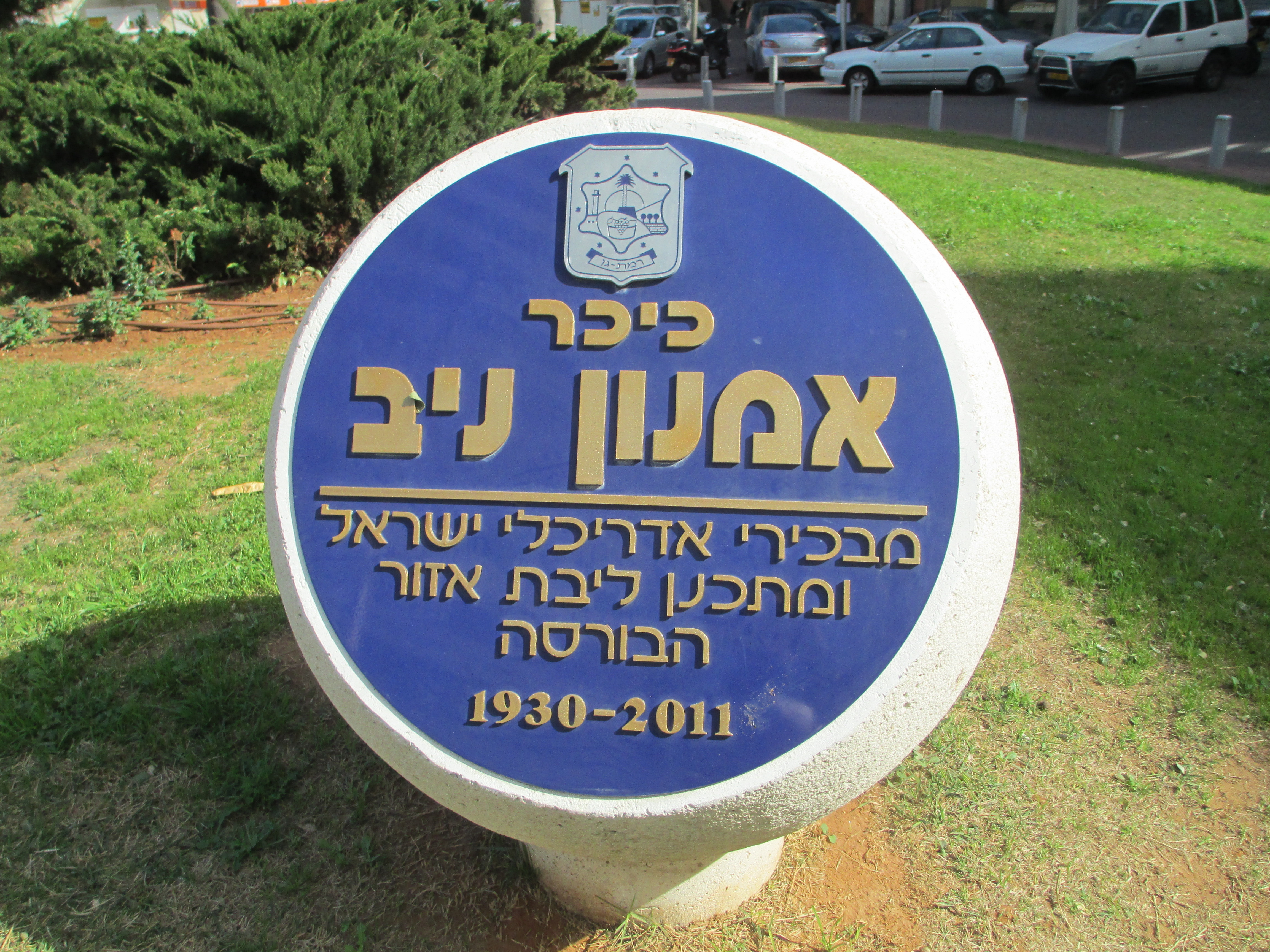 כיכר על שם אמנון ניב ברמת גן